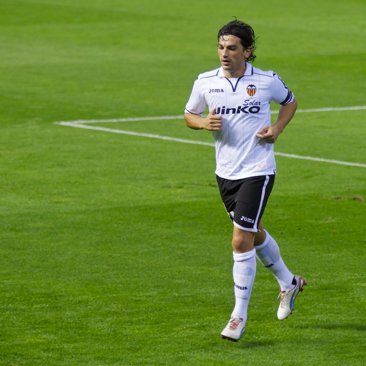 Tino Costa (Valencia CF vs ESP, 2012).